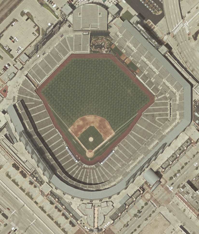 Coors Field satellite view in April 2004.